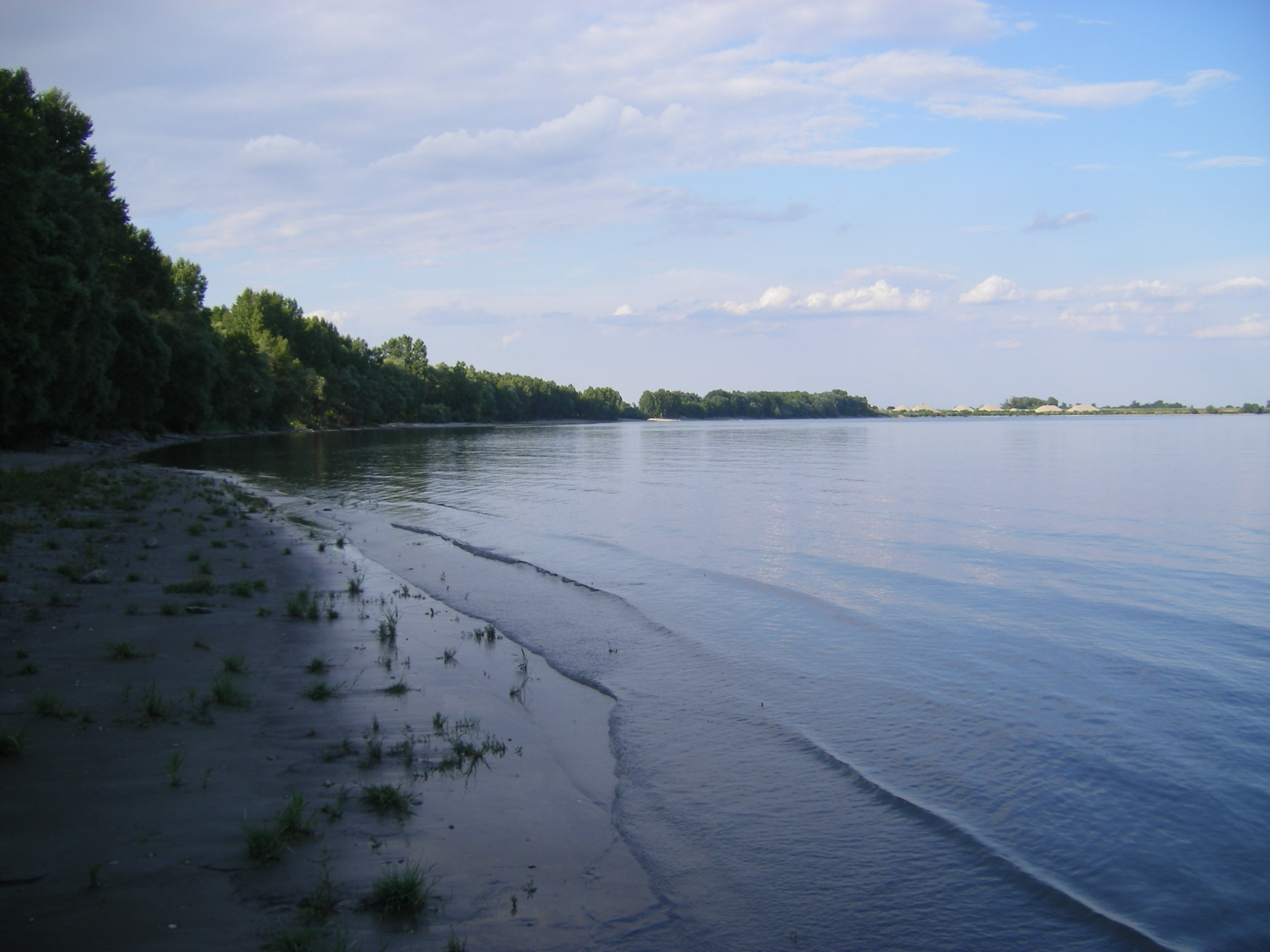 Csallók˜özaranyos - a Duna-part a Léli-szigetnél